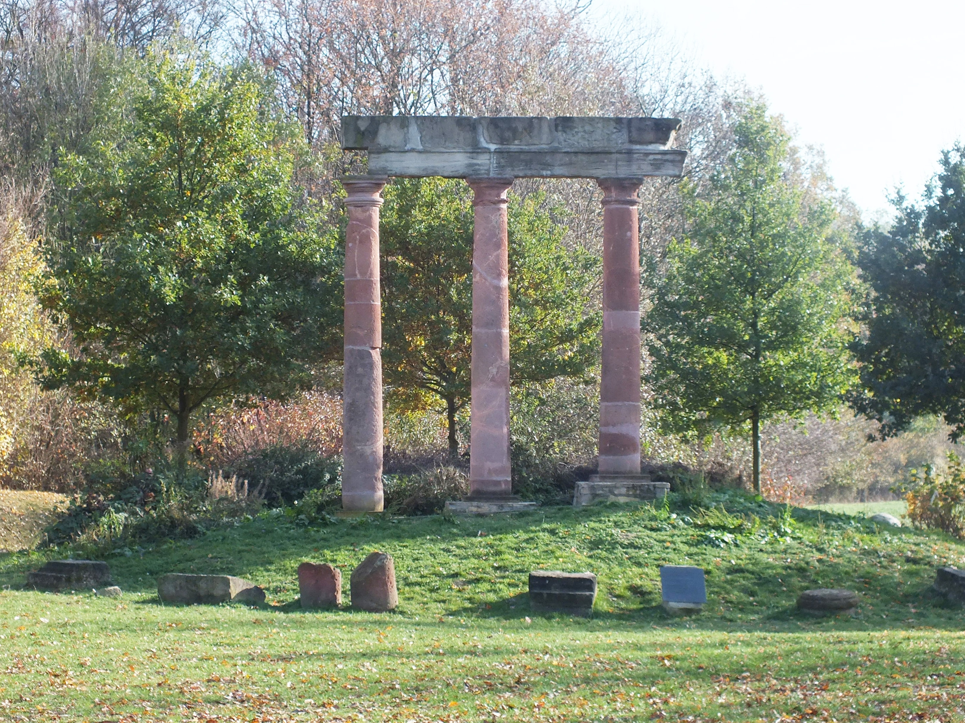 Künstliche Tempelruine „Trianon“ am Ende der Lindenallee des ehemaligen Schlosses Eythra